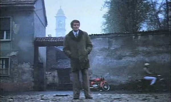 Fotogrammi girati a Balsamo dal film Delitto d'amore (1974) di Luigi Comencini.